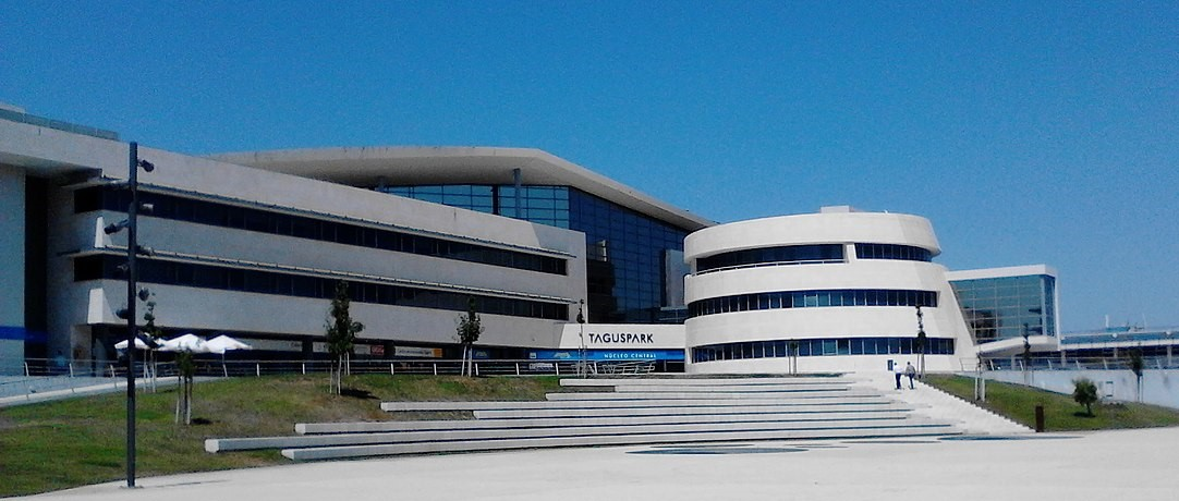 Centro de Congressos do Taguspark